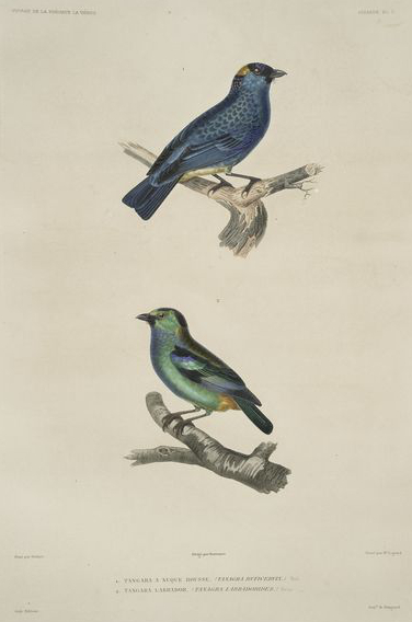 Tangara ruficervix & Tangara labradorides